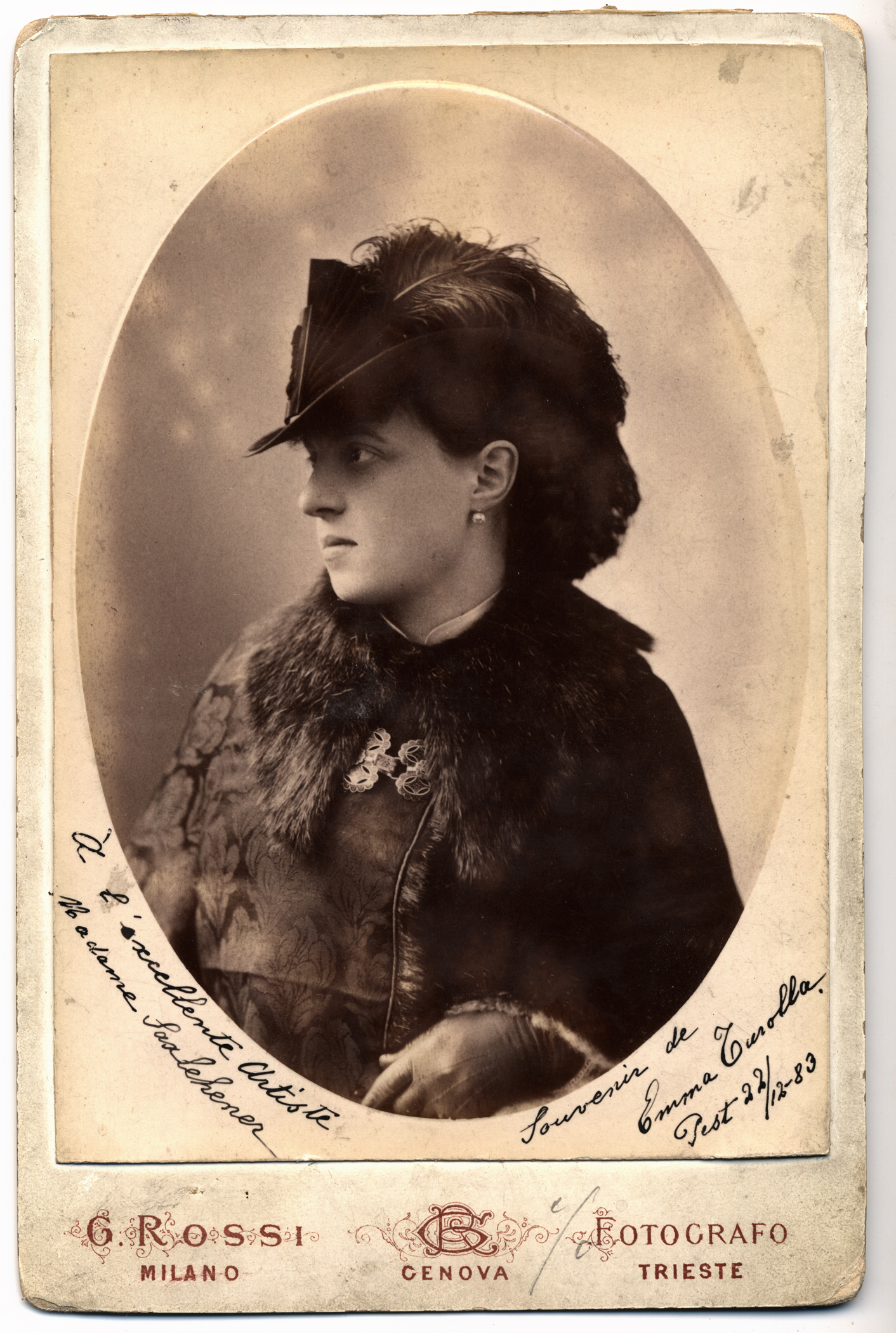 Turolla Emma olasz születésü operaénekesnő, a Magyar Királyi Operaház tagja. A felvételt Giulio Rossi festő és fényképész készítette 1883. december 22-én